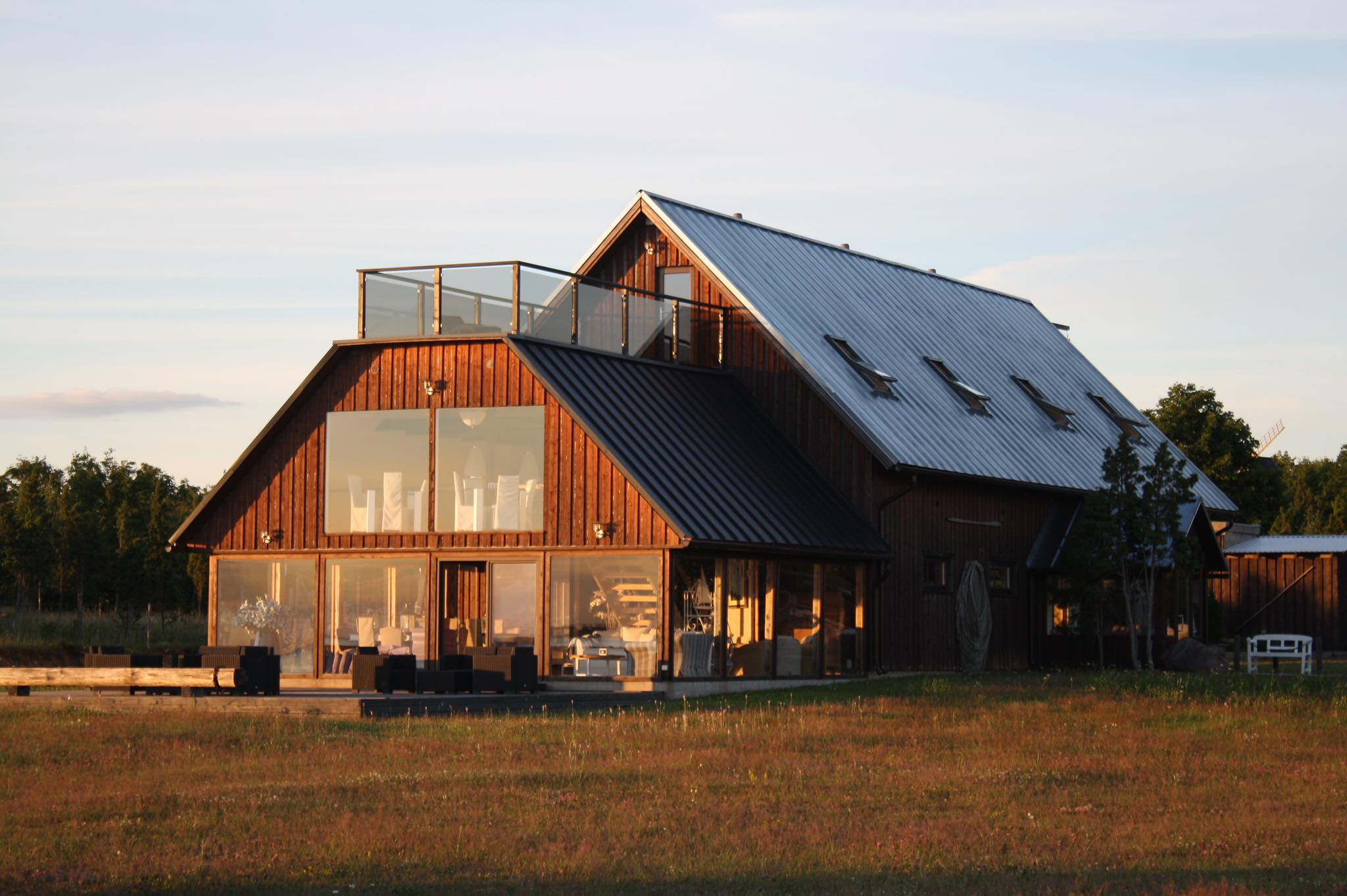 Bottengarn butiikkülalistemaja Koguva Sadamas